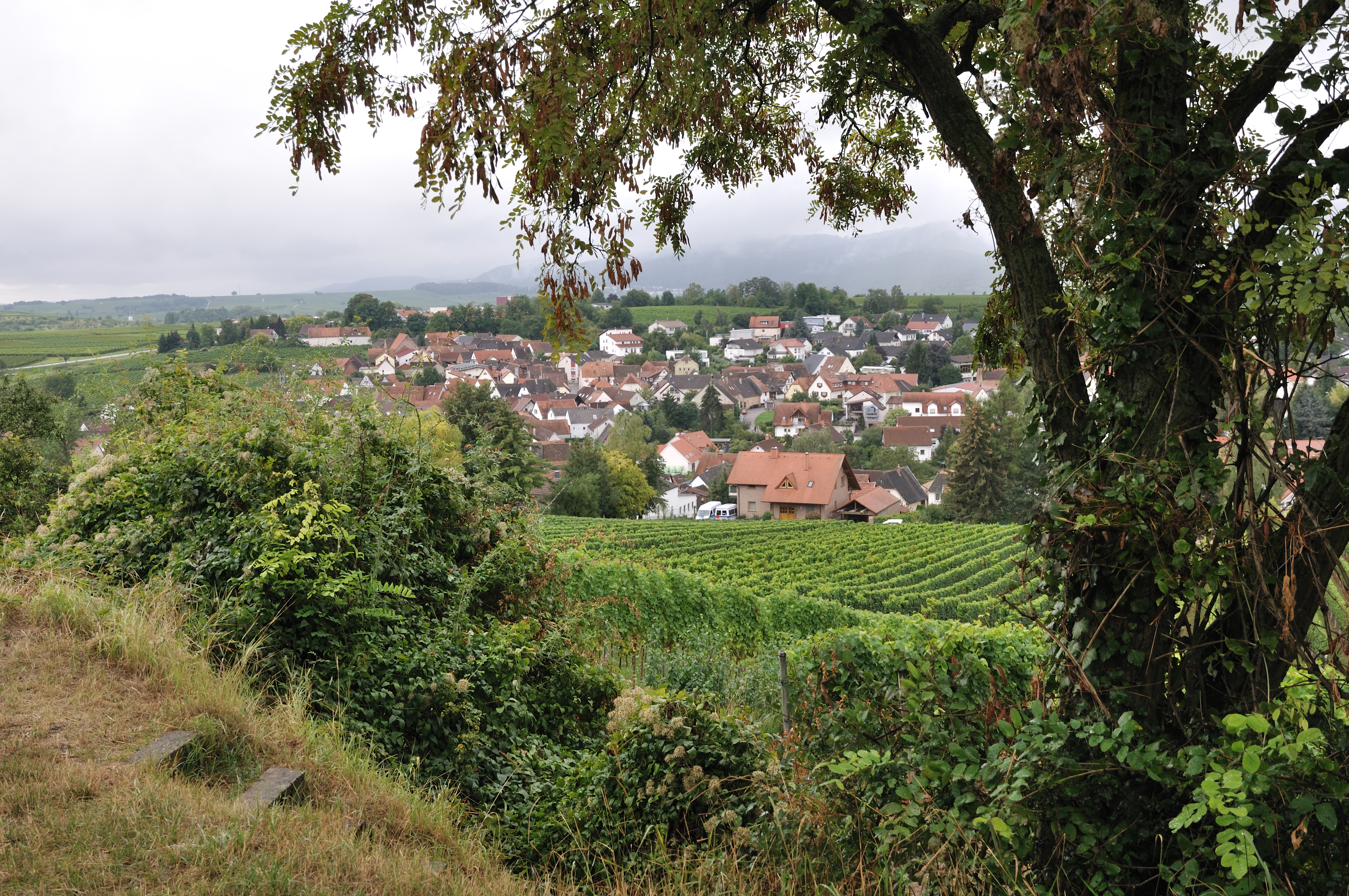 Ilbesheim, südliche Weinstraße, Pfälzerwald